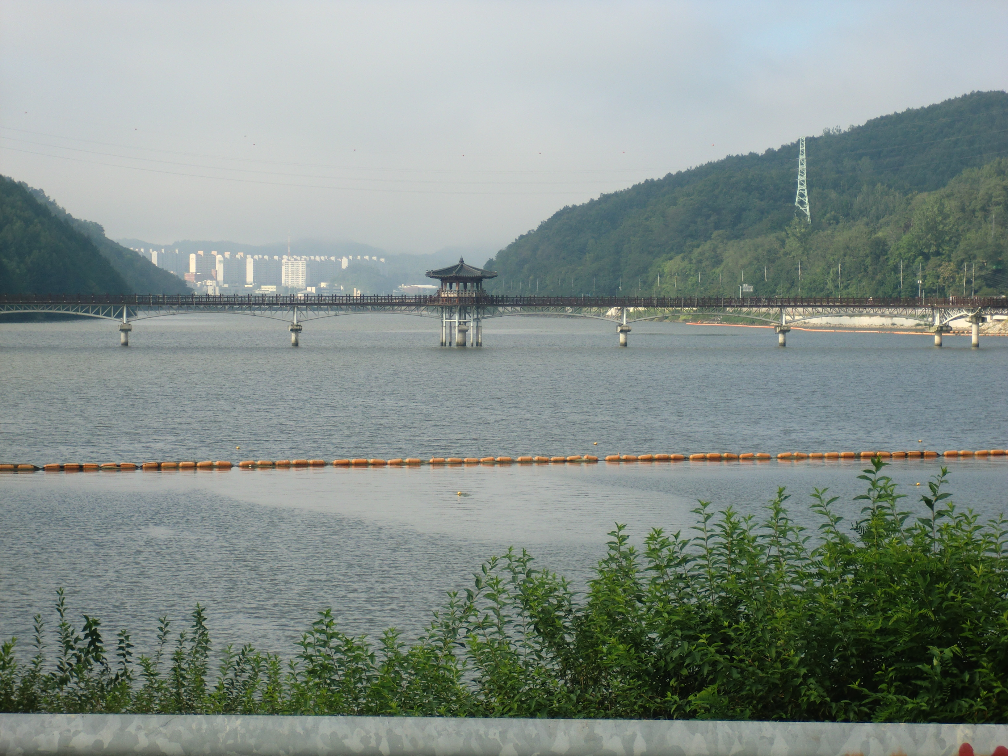 경상북도 안동시에 있는 월영교